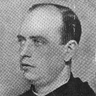 Augustin Schubert (1902 - 1942), Český římskokatolický kněz.